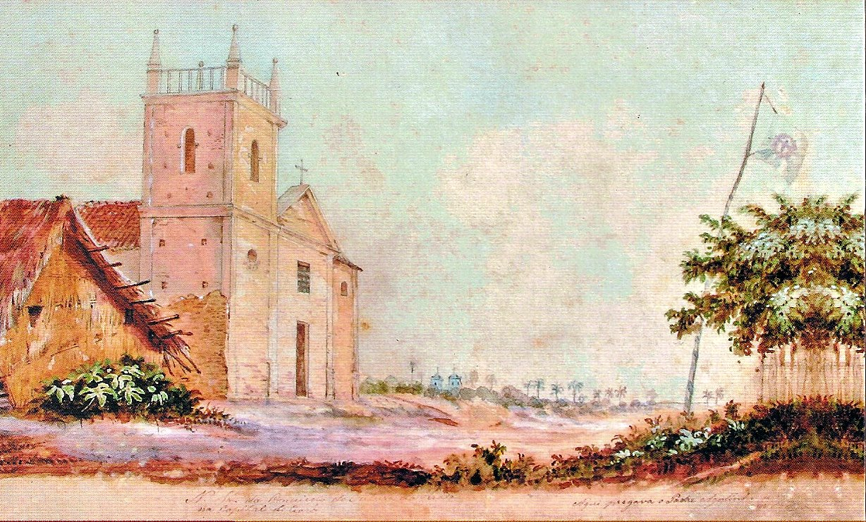 Imagem do Imagen da Capa do livro "Diário de viagem de Francisco Freire Alemão: Crato-Rio de Janeiro, 1859-1860" de José dos Reis Carvalho em 1859